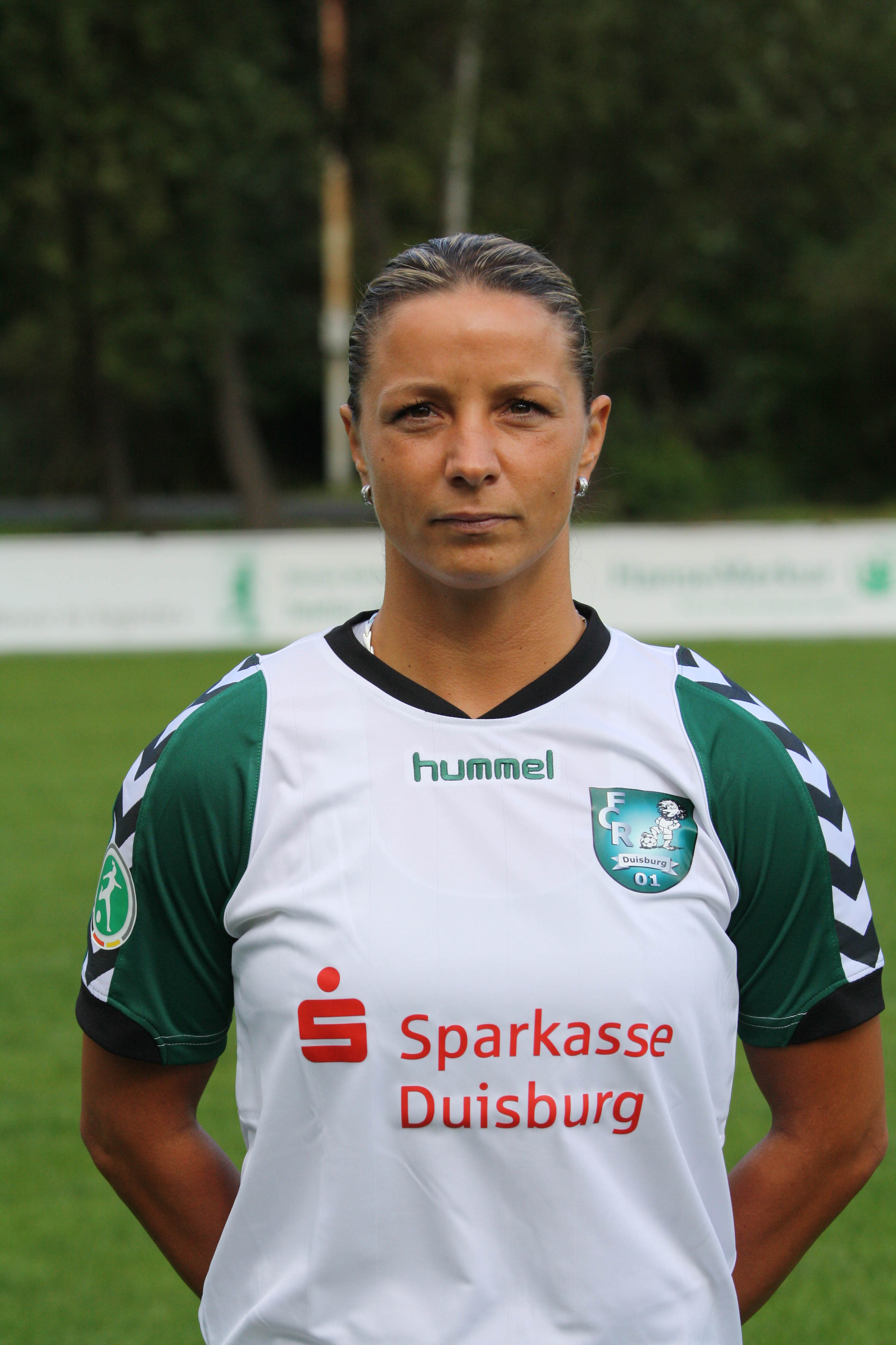 Inka Grings, FCR 2001 Duisburg, Saison 2011/12